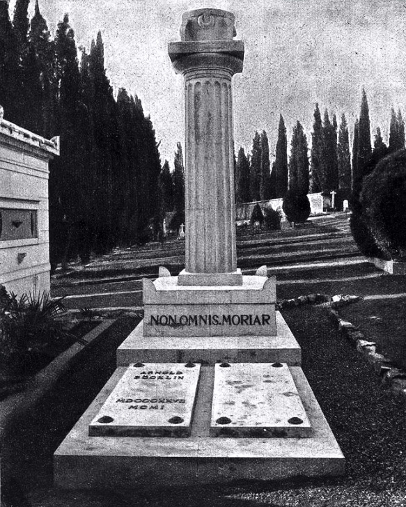 Arnold Böcklin (1827–1901) wurde wie Karl Stauffer (1857–1891) auf dem protestantischen Friedhof Cimitero Evangelico agli Allori bei Florenz beigesetzt. Böcklins Grab wurde von seinem Sohn Carl Böcklin entworfen. Der Unterbau trägt die Grabinschrift -Non omnis moriar-( Nicht ganz werde ich sterben- nicht Alles stirbt an mir)